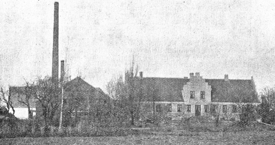 Nybøllegård er en lille sædegård, som nævnes første gang i 1580. Gården ligger i Hillerslev Sogn, Sallinge Herred, Ringe Kommune. Hovedbygningen er opført i 1856-1858.